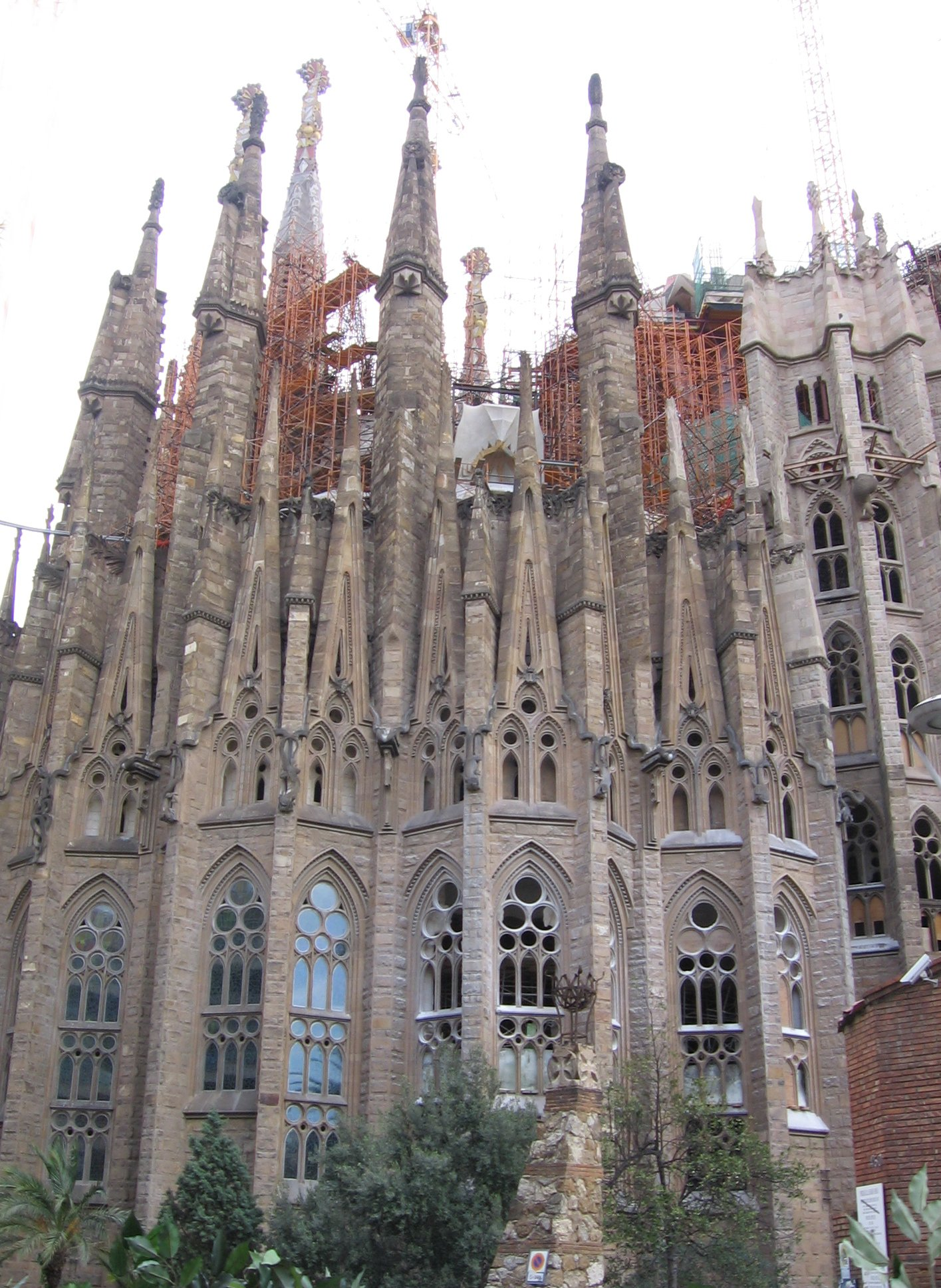 Sagrada Familia - Ábside